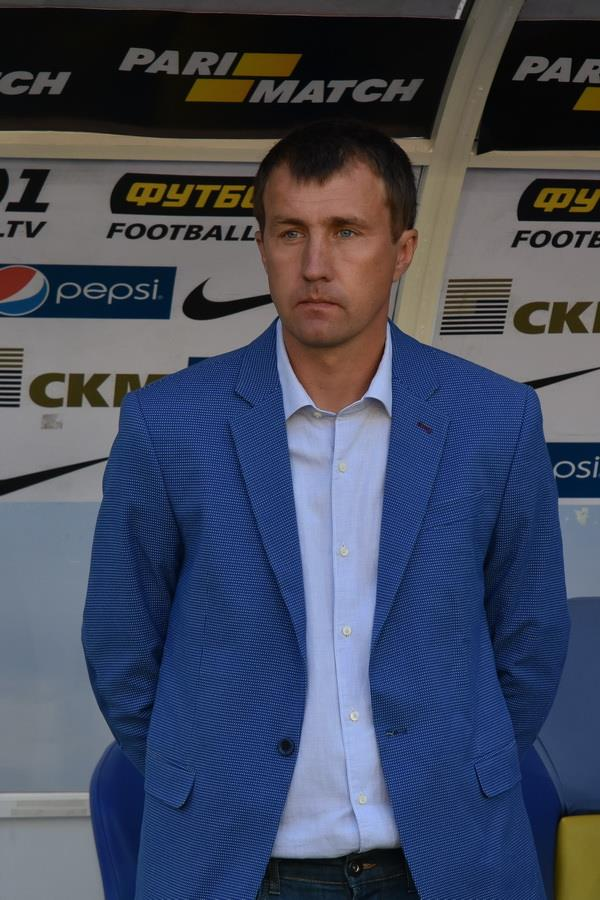 Сергей Лавриненко - украинский футболист и тренер